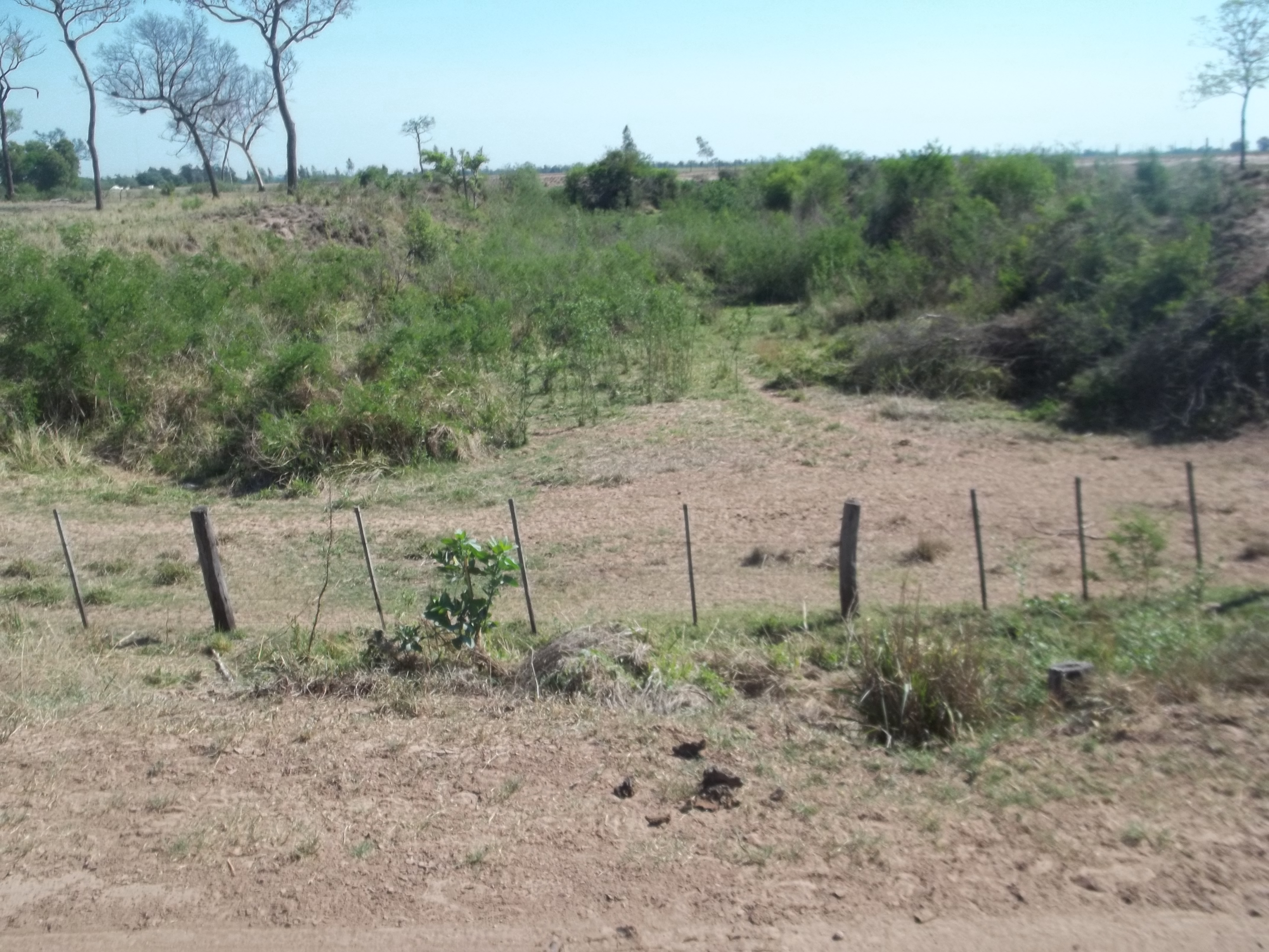 Vista del zanjón seco del riacho Nogueira dentro de una estancia.